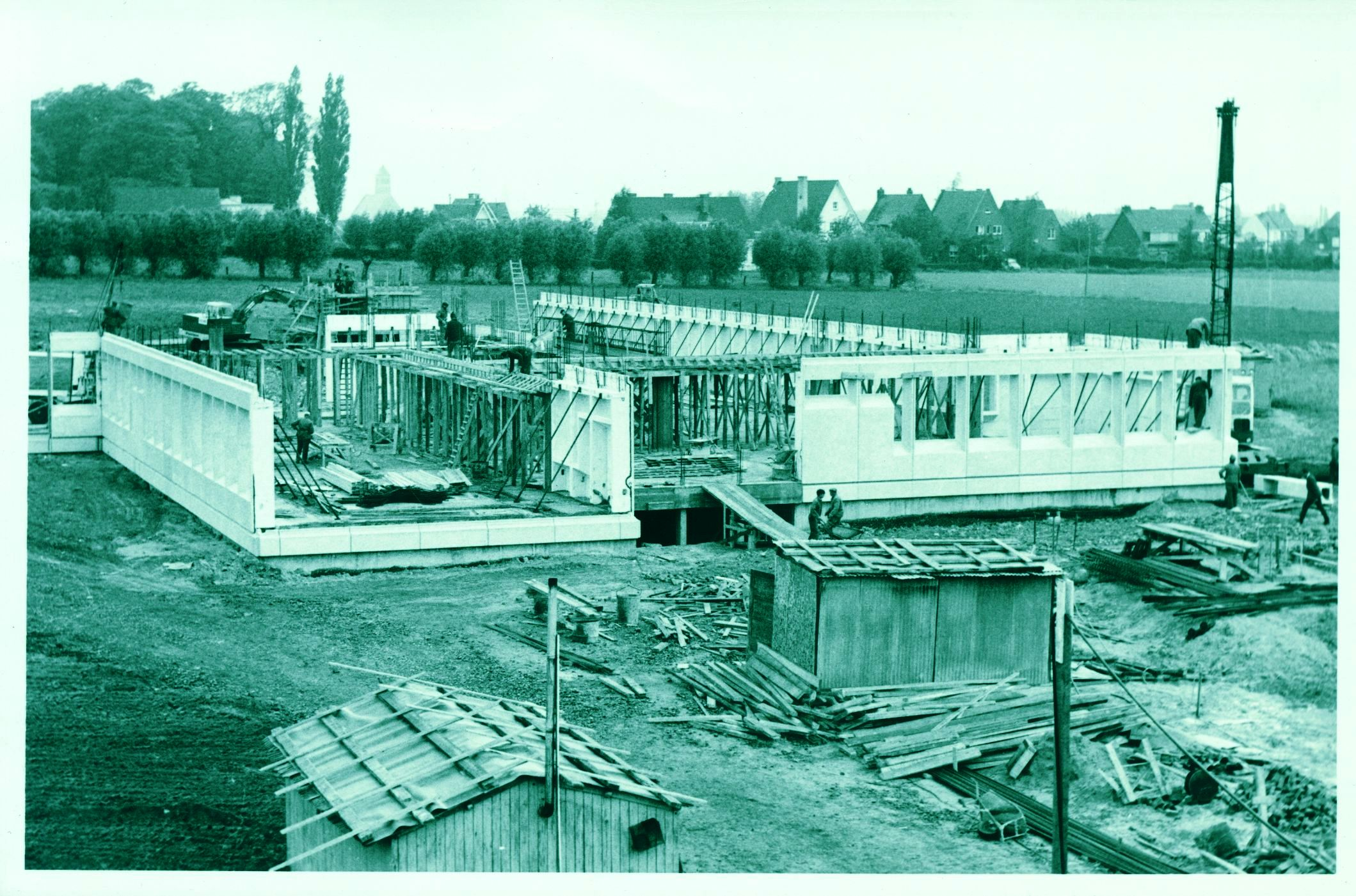 Midden jaren zestig wordt er werk gemaakt van een nieuw schoolgebouw voor Ipsoc.